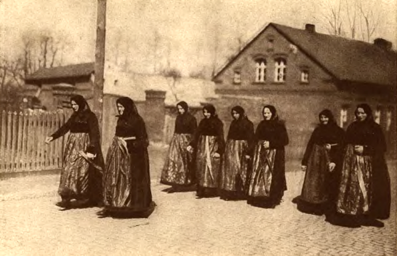 Schönwälder Frauen in Festtagstracht beim Kirchgang